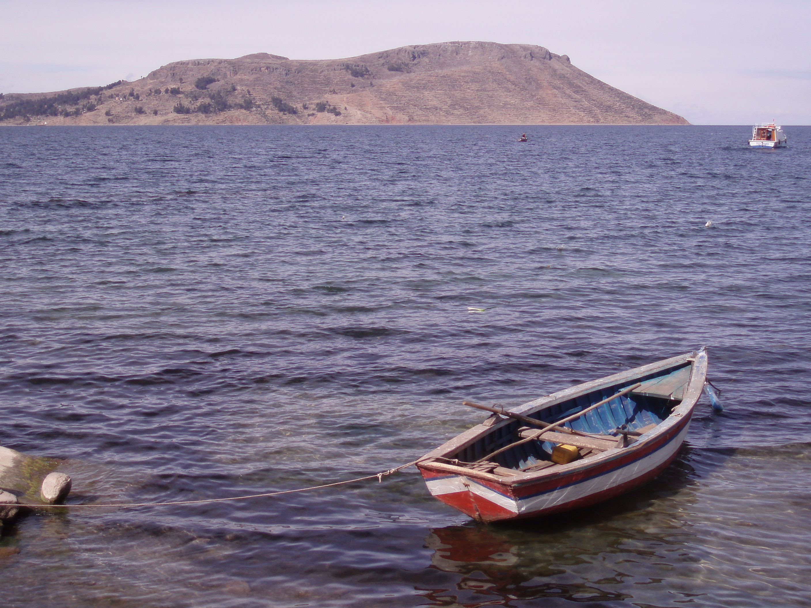 Bolivia G2 262 Amantaní